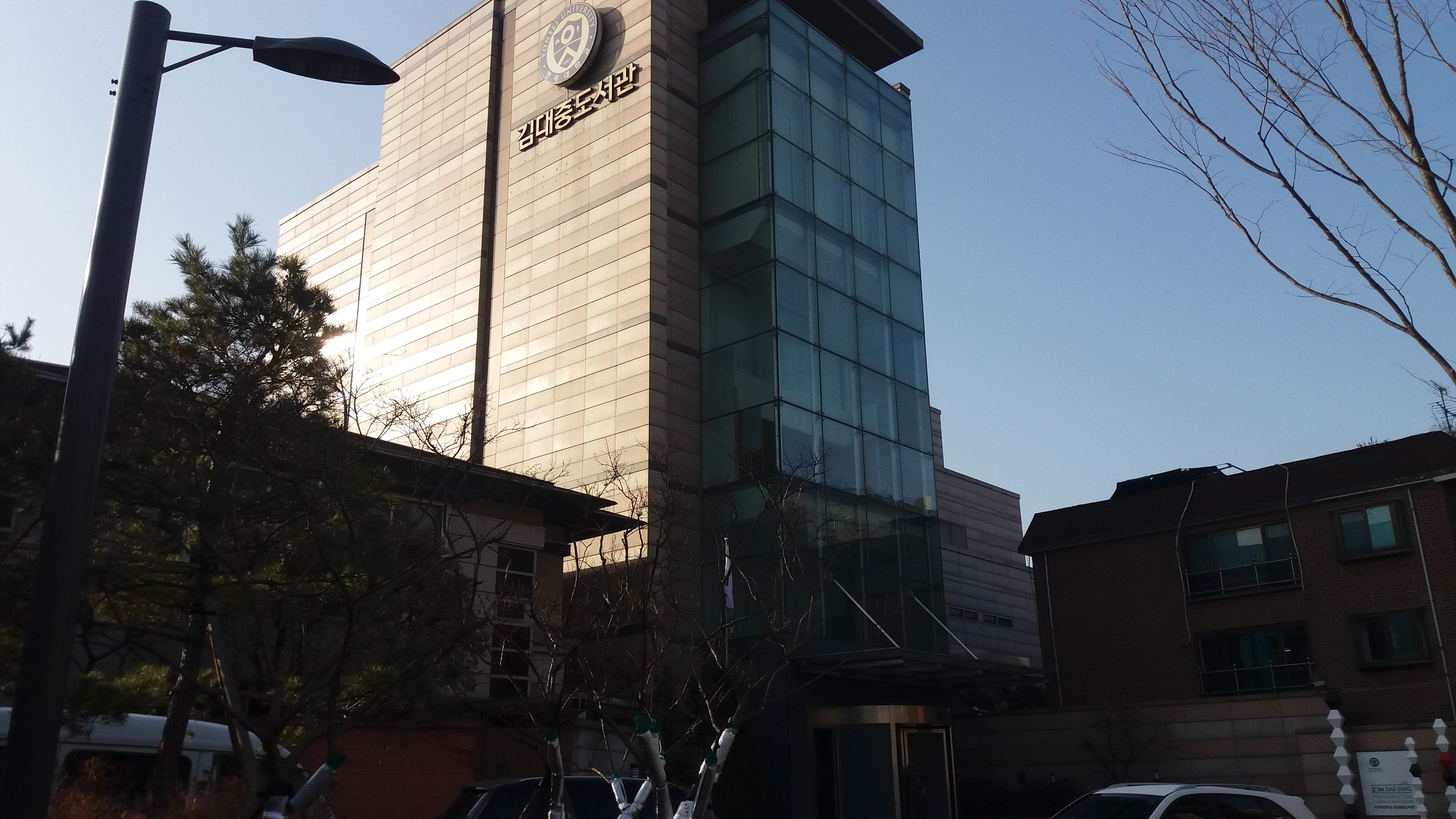 김대중도서관